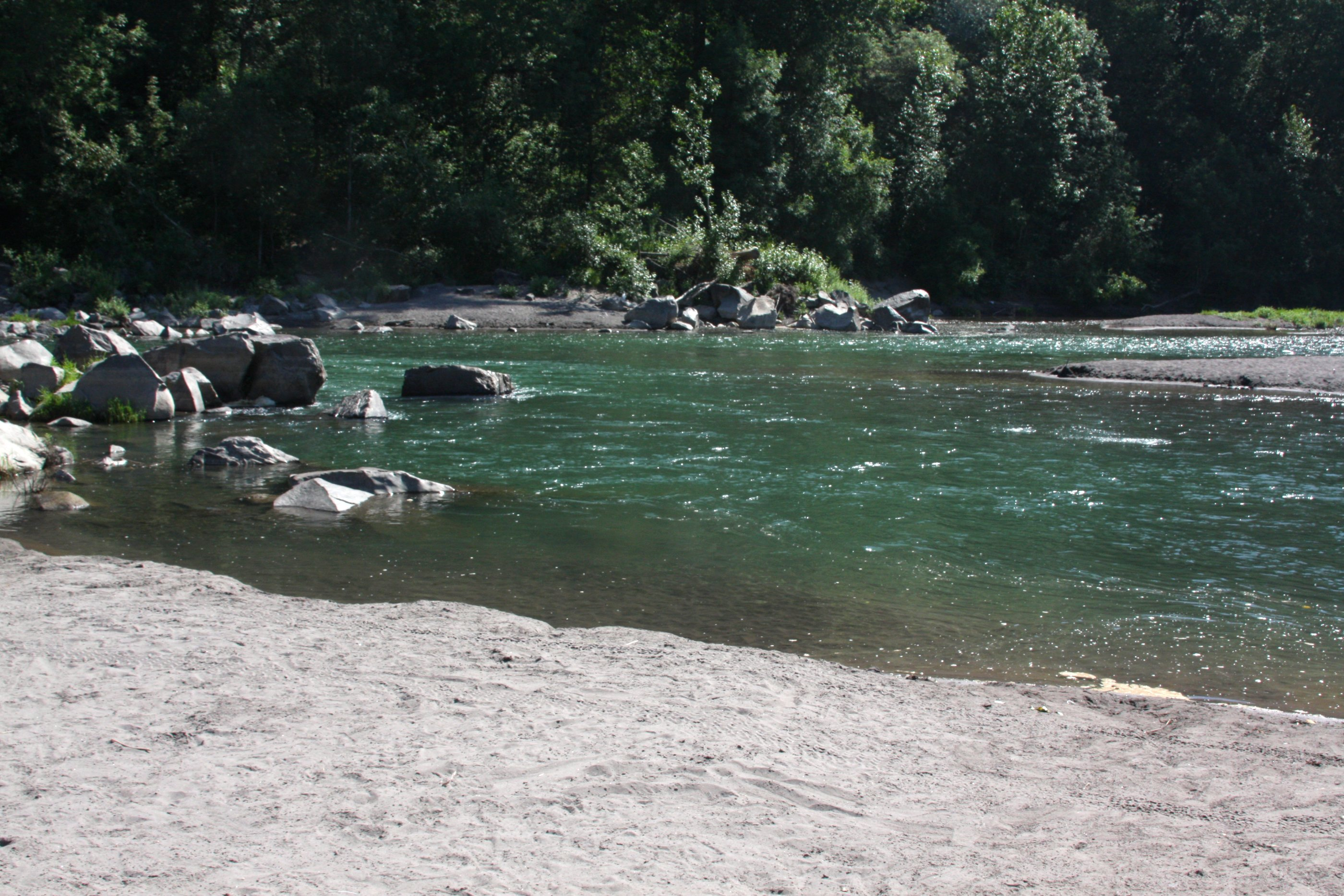 Glenn Otto Park